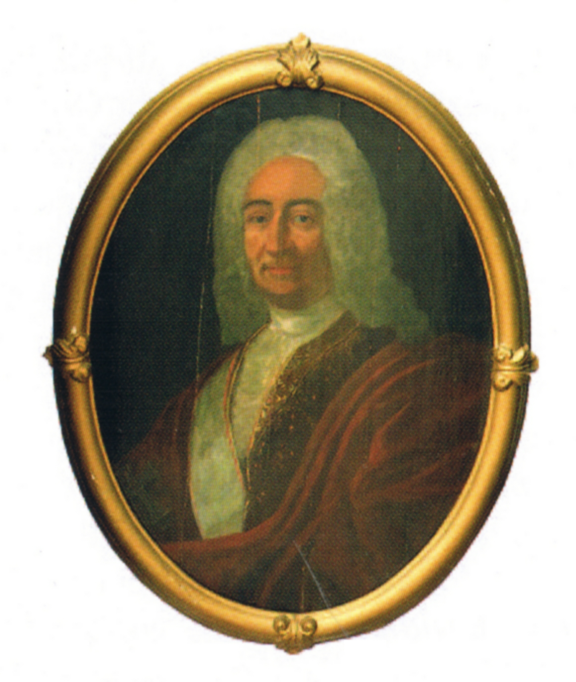 Heinrich von Reventlow, Herr auf Colmar, Cronshagen und Colmar. Kaiserlicher Hofrat und Klosterprobst von Uetersen, Träger des Dannebrogorden.